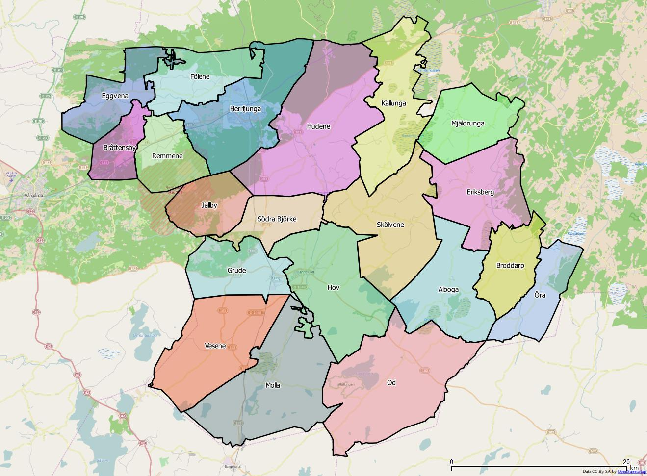 Distriktsindelningen i Herrljunga kommun